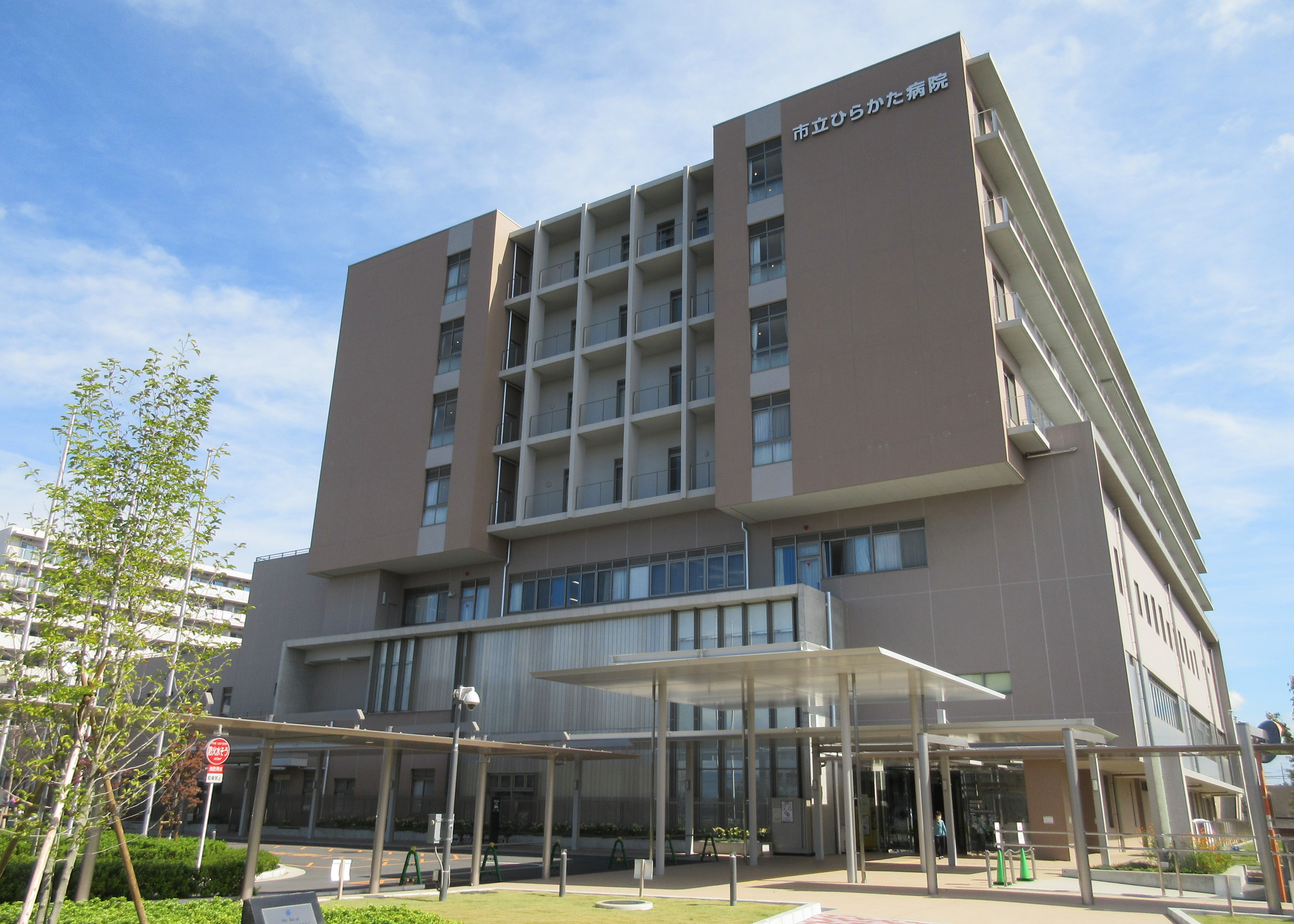 市立ひらかた病院